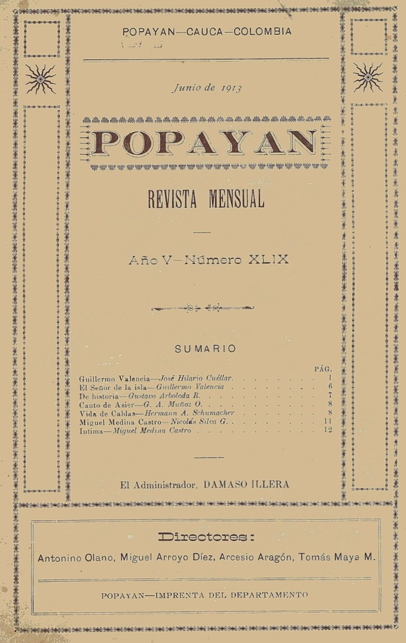 Edición N° XLIX de la revista Popayán año 1913